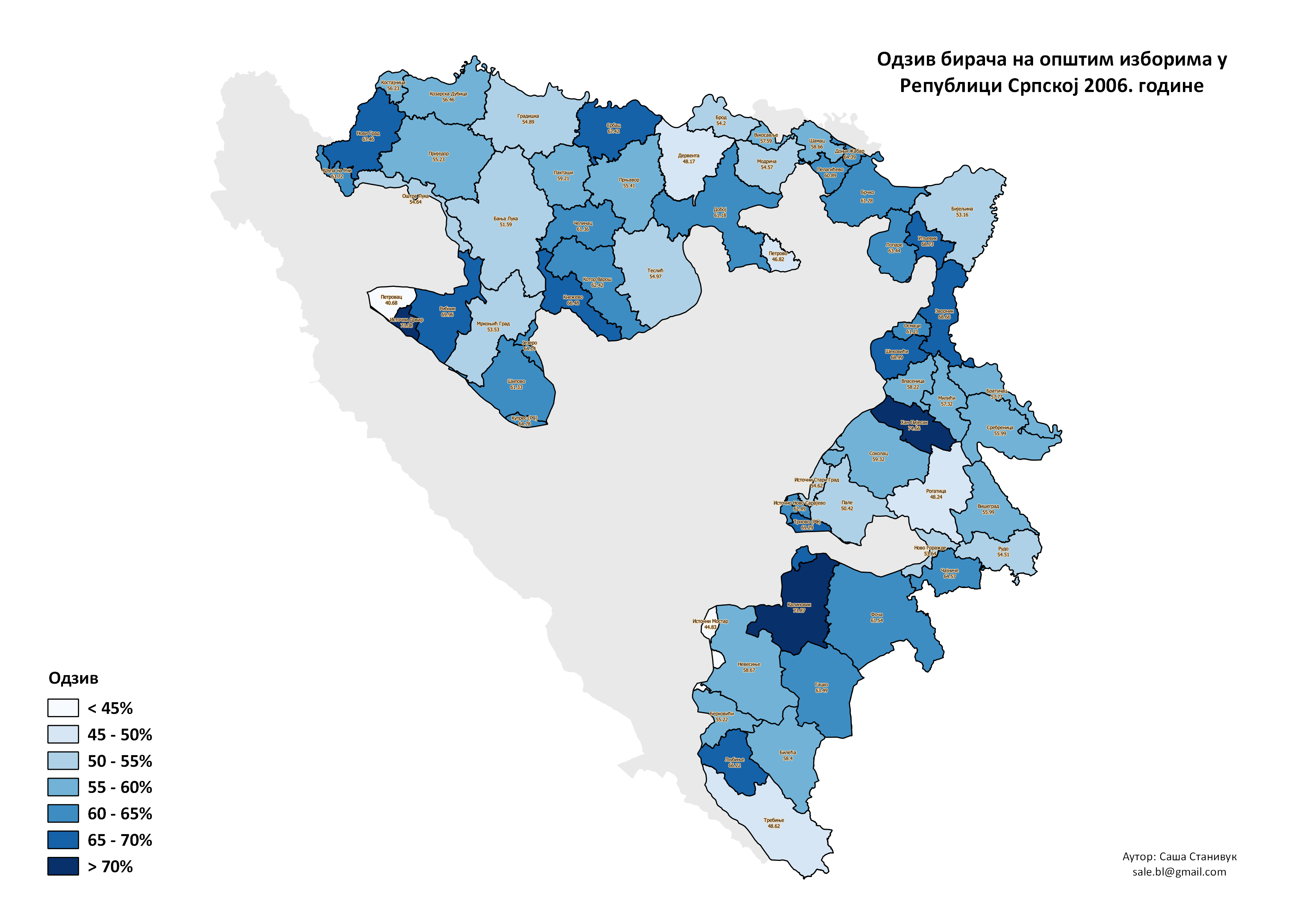 Српски (ћирилица): Одзив бирача на изборе 2006. у Републици Српској